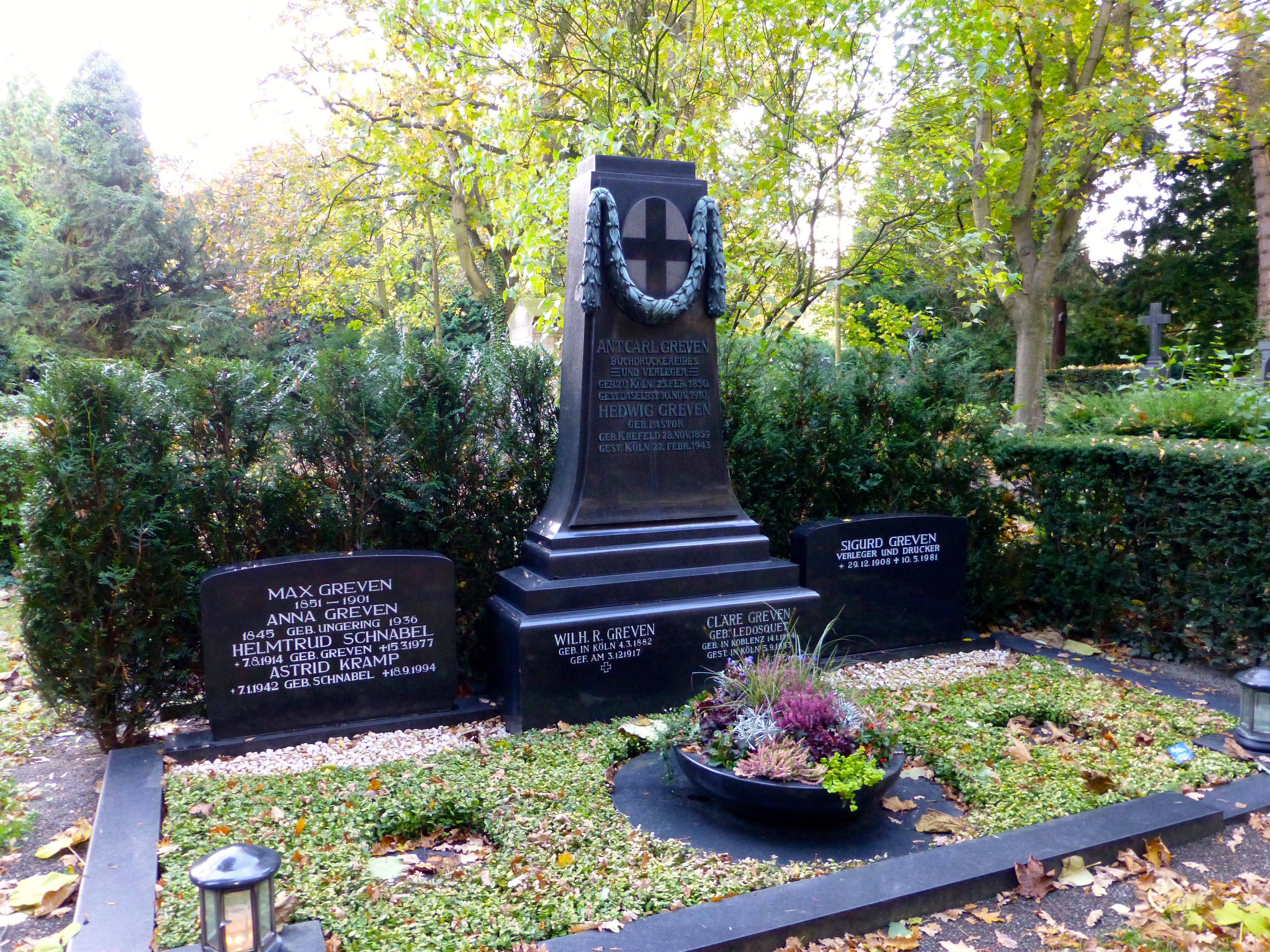 Grabstelle auf dem Melaten-Friedhof: Familengrab Anton Carl Greven